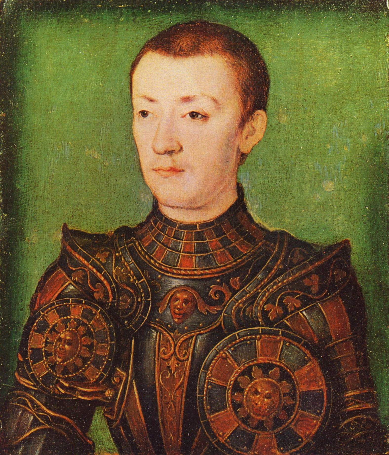 Depicted person: Henri, dauphin de France (future king Henri II)